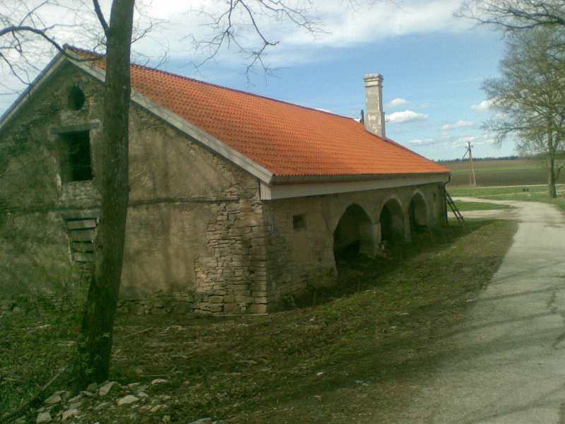 Röa mõisa ait.